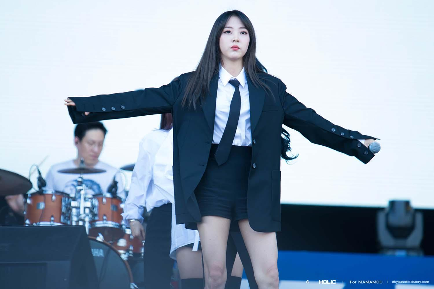 17.09.23 조이올팍페스티벌 - 마마무(MAMAMOO)